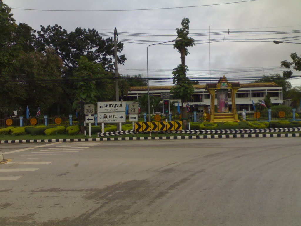 แยกแขวงการทางเลยที่ 1